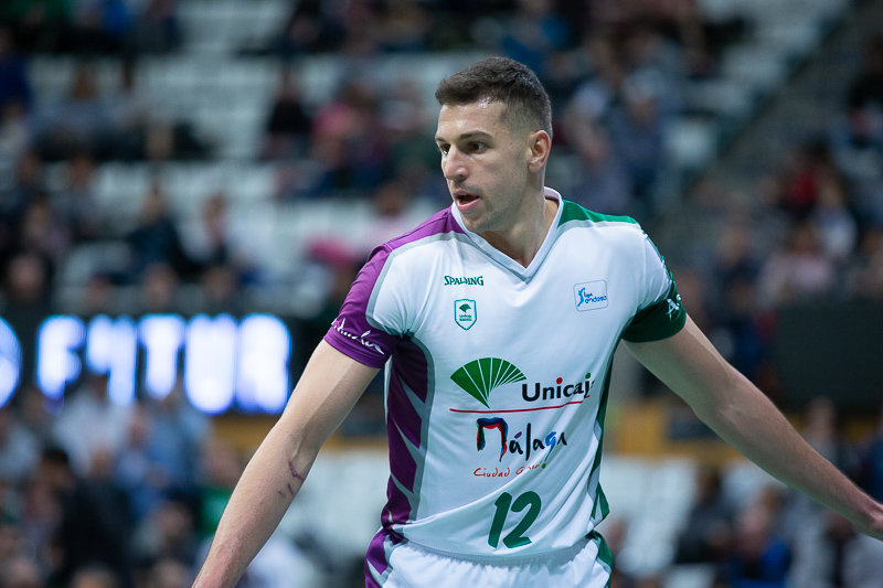 Dragan Milosavljevic en un partido de la liga ACB en el Palau Olímpic de Badalona entre el Divina Seguros Joventut y el Unicaja.